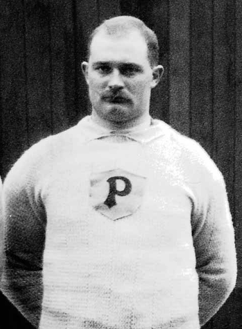 Adolf Bergman